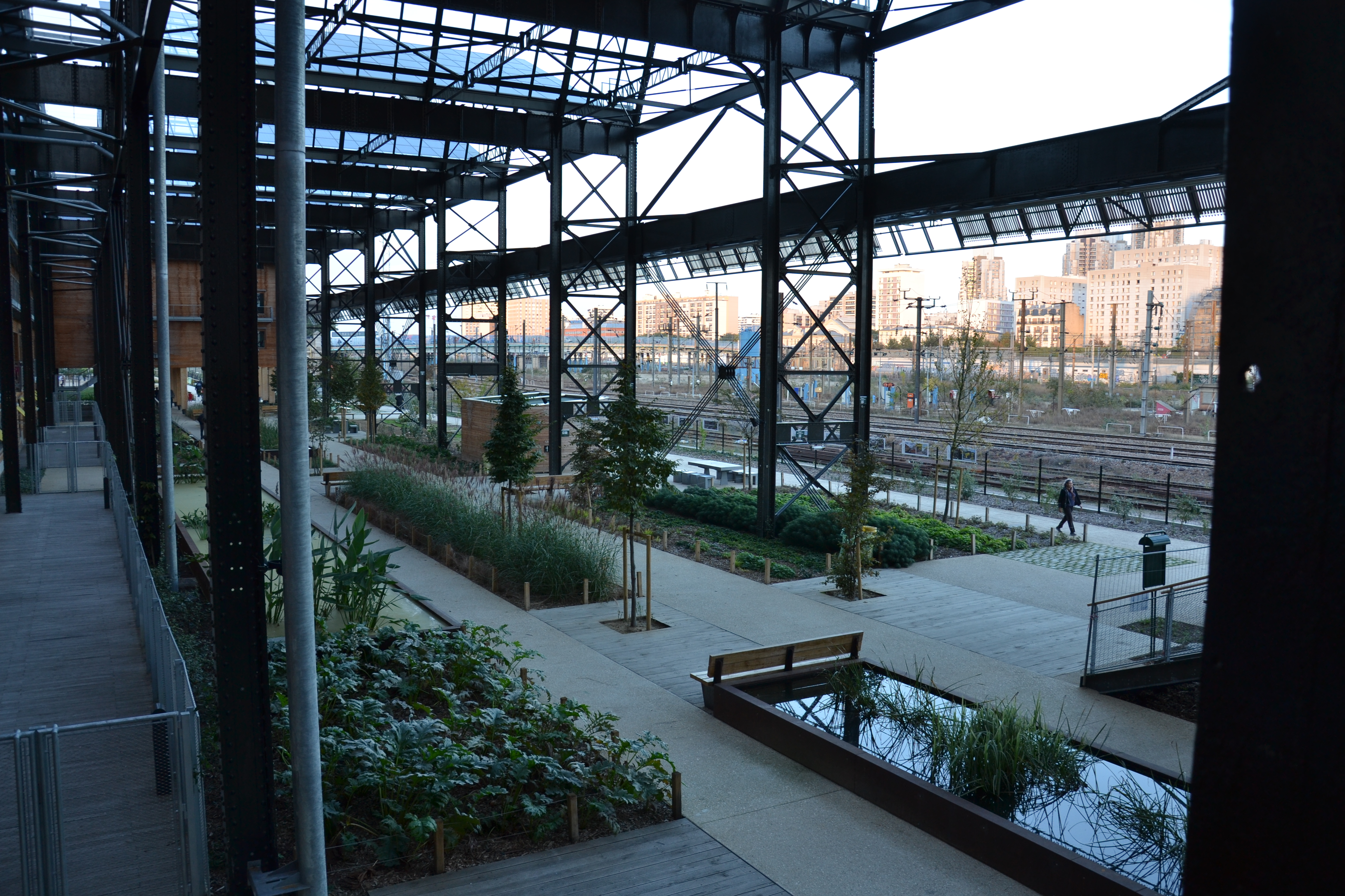 Jardin Rosa Luxembourg. Un éco-quartier dans un bâtiment désaffecté de la SNCF, 3.500 m² de panneaux solaires photovoltaïques. Architecte Françoise-Hélène Jourda